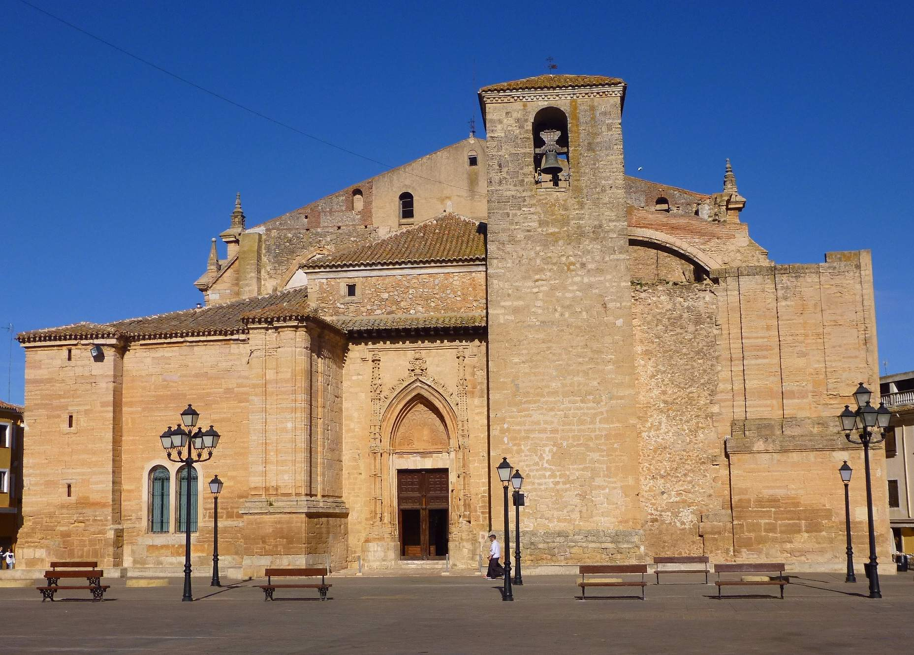 Iglesia de San Blas (Villarrobledo)